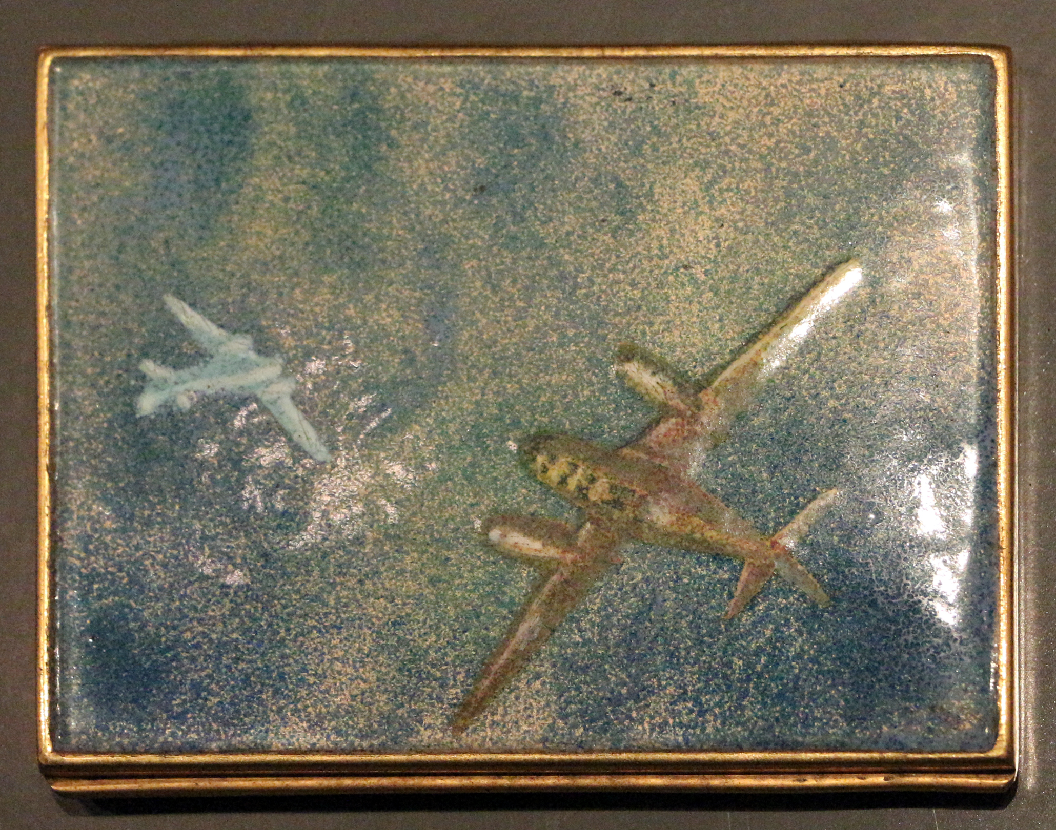 Il parco e i musei di Nervi This is a photo of a monument which is part of cultural heritage of Italy.